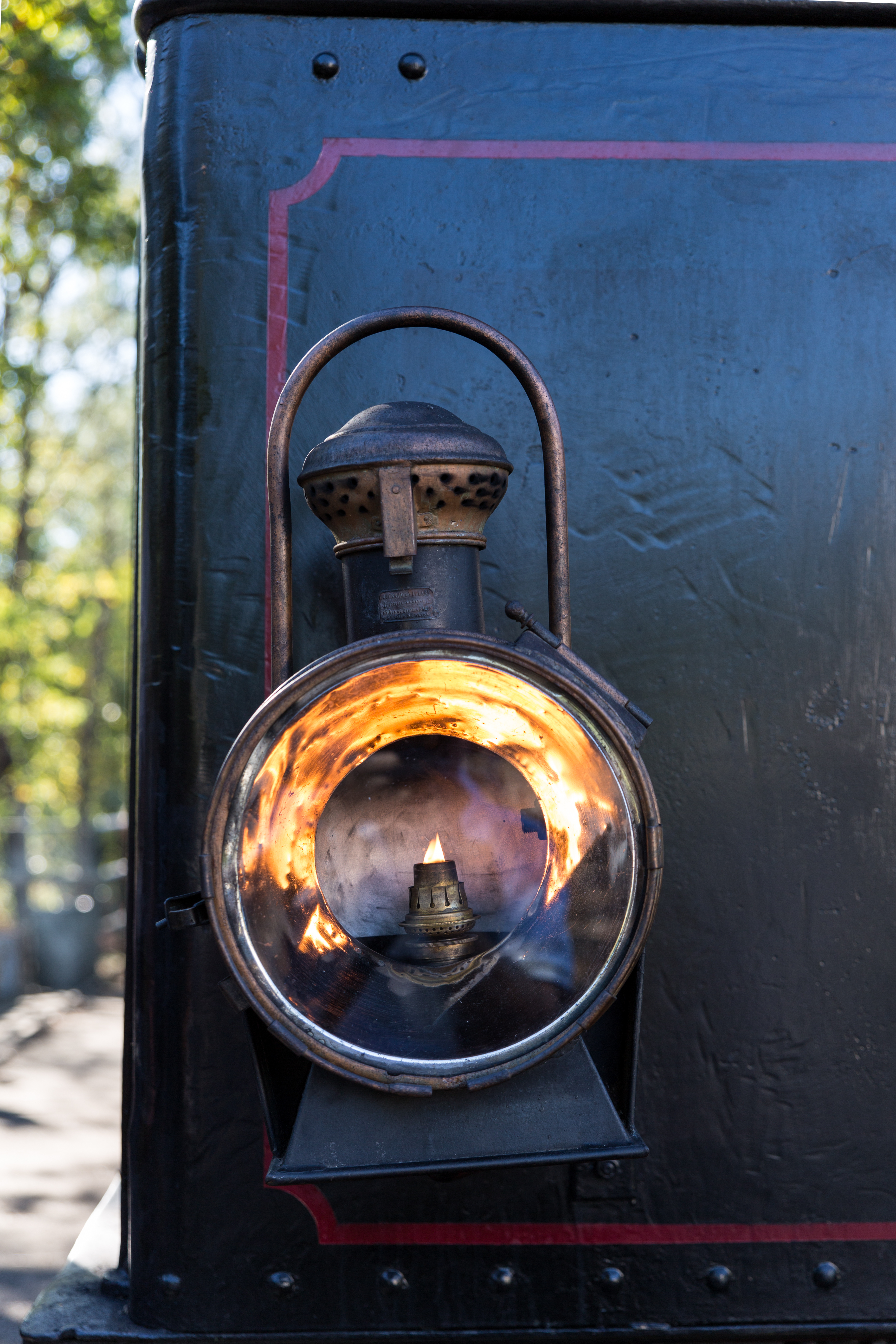 Feu de marche (sur l'arrière de loco au retour)